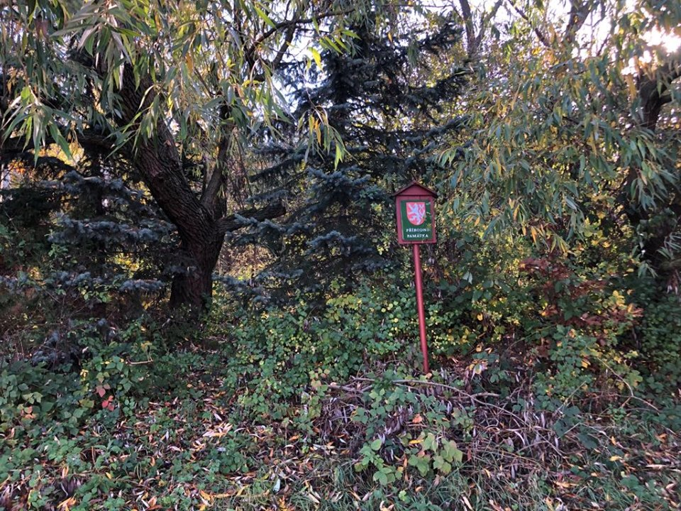 Fotografie státního znaku u PP Kněživka